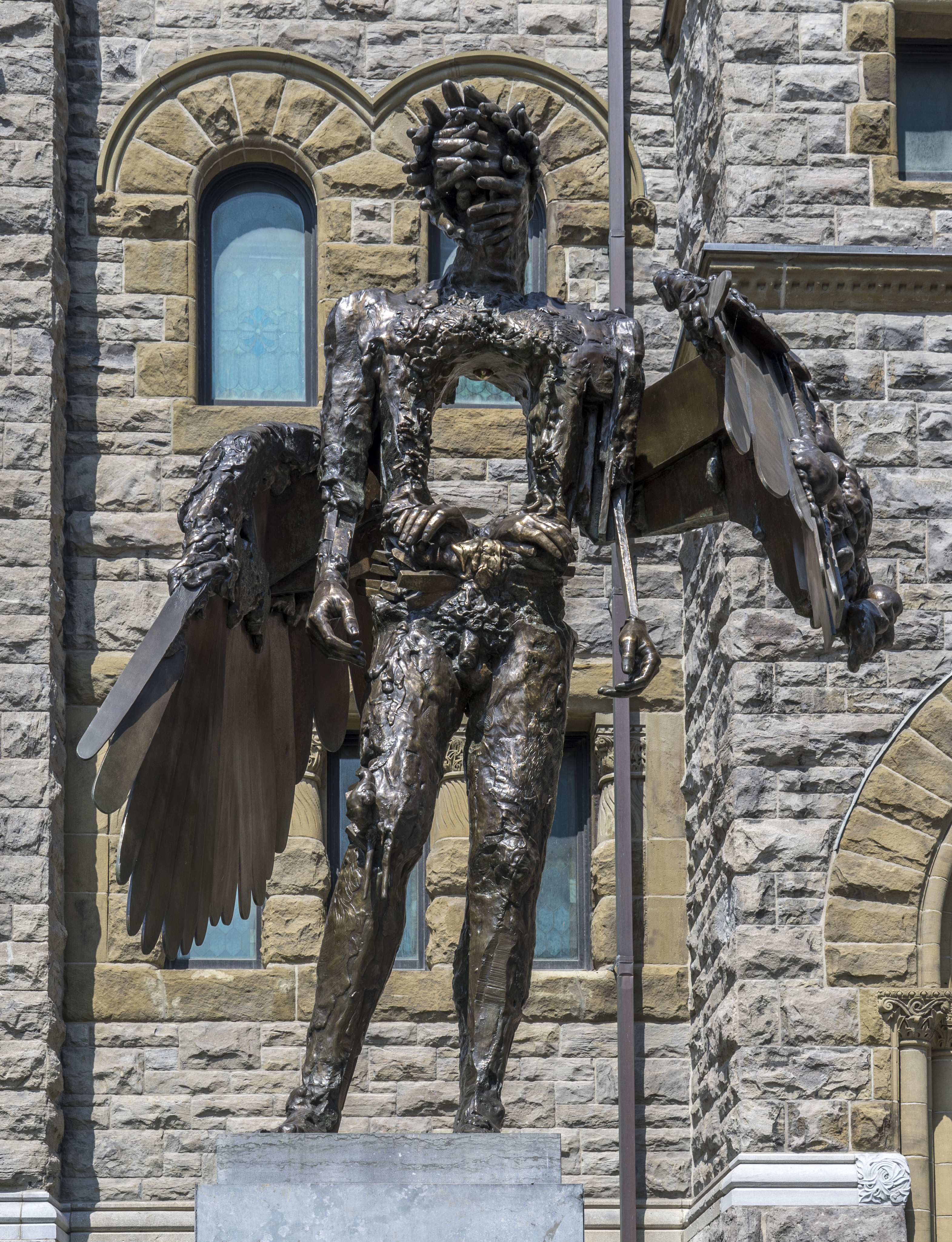 The Eye, David Altmejd, 2011